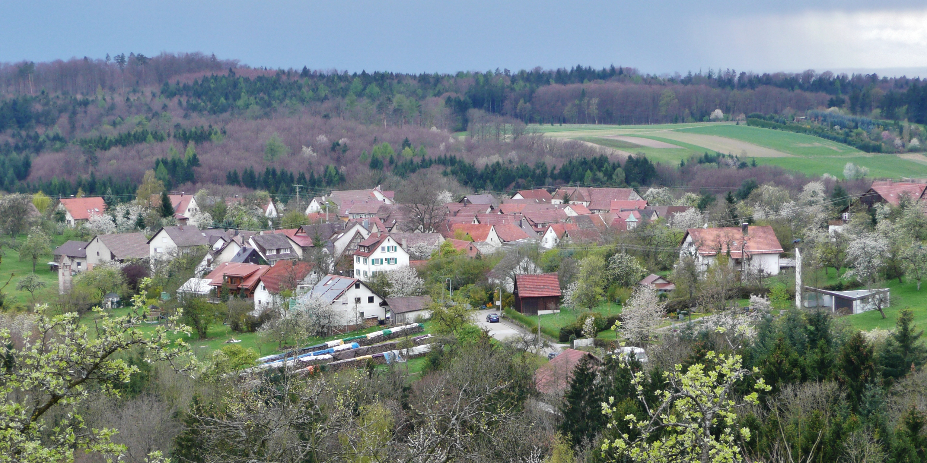 Nassach, ein Weiler und Ortsteil von Spiegelberg, Ansicht von Nordosten. Im Vordergrund ganz rechts der Friedhof.